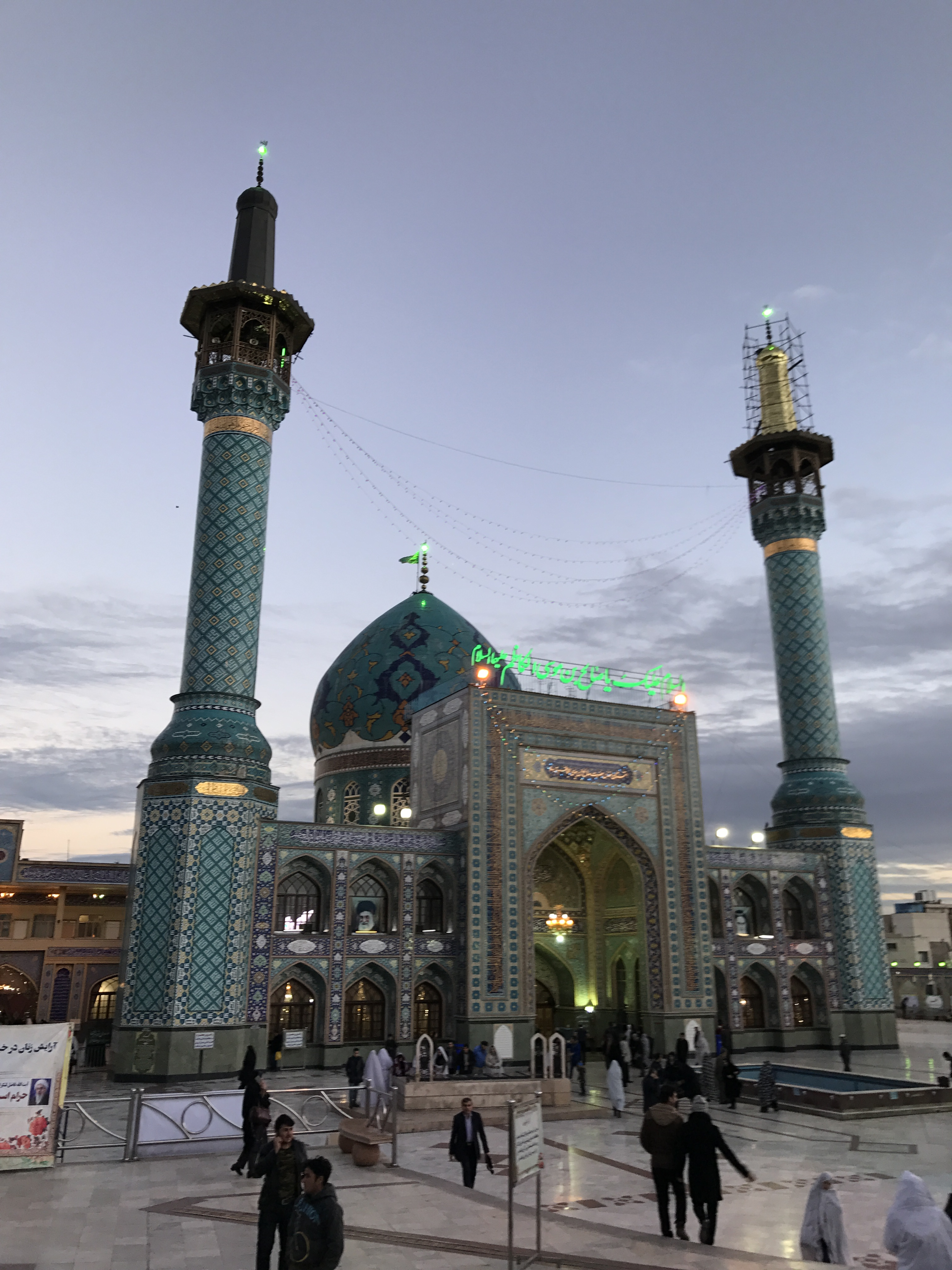 امامزاده صالح